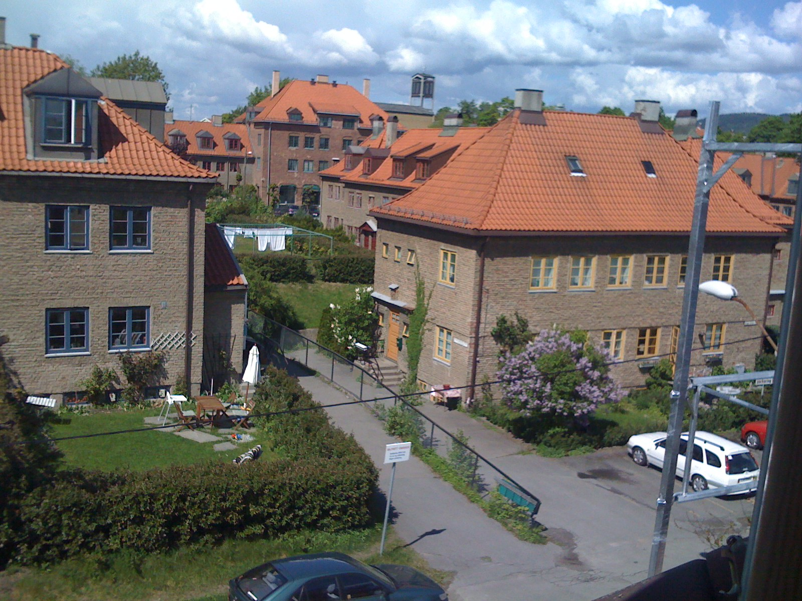 Lille Tøyen området på indre Oslo Øst / Lille Tøyen-area in Oslo